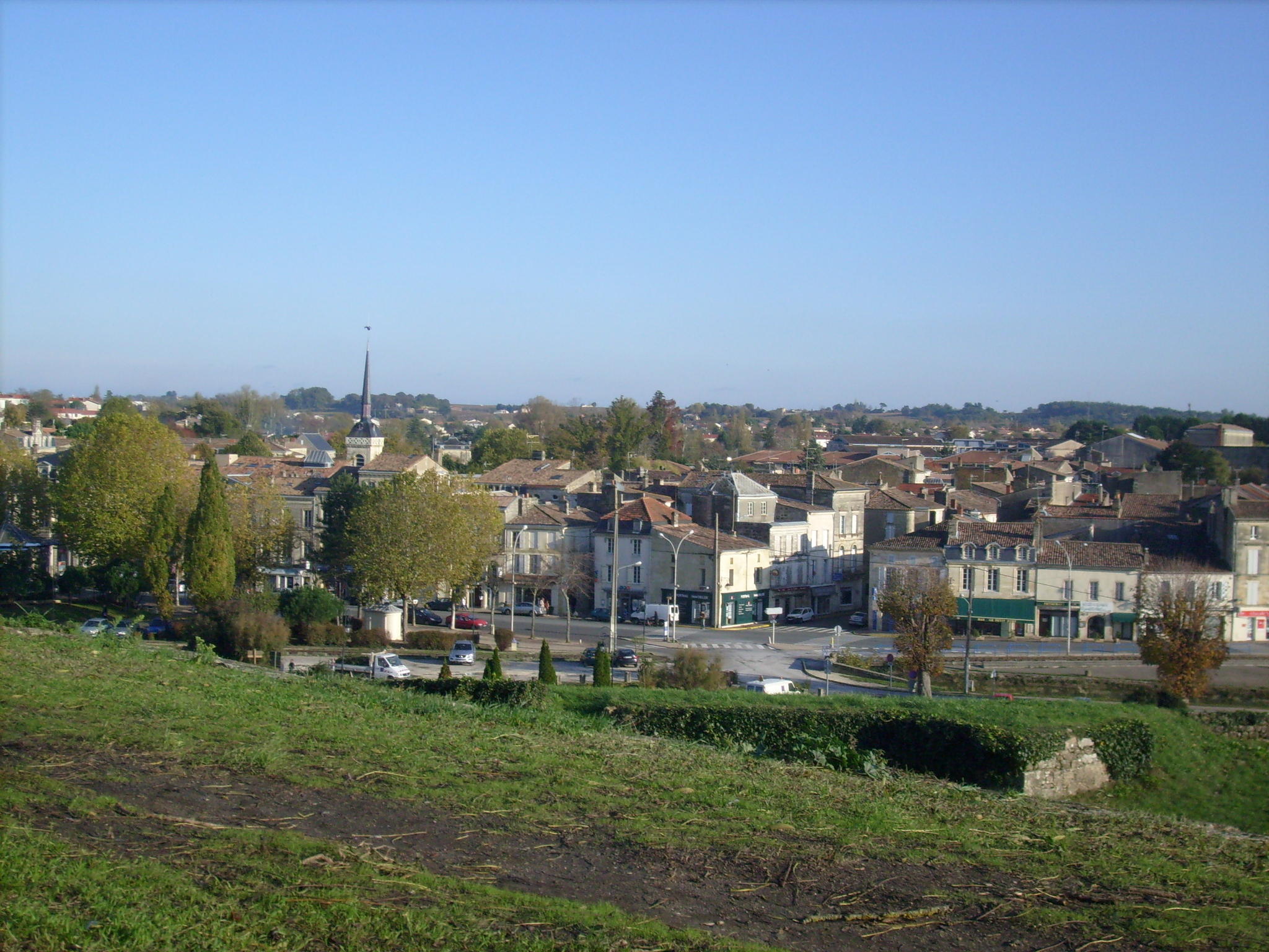 Panorama de Blaye depuis la citadelle